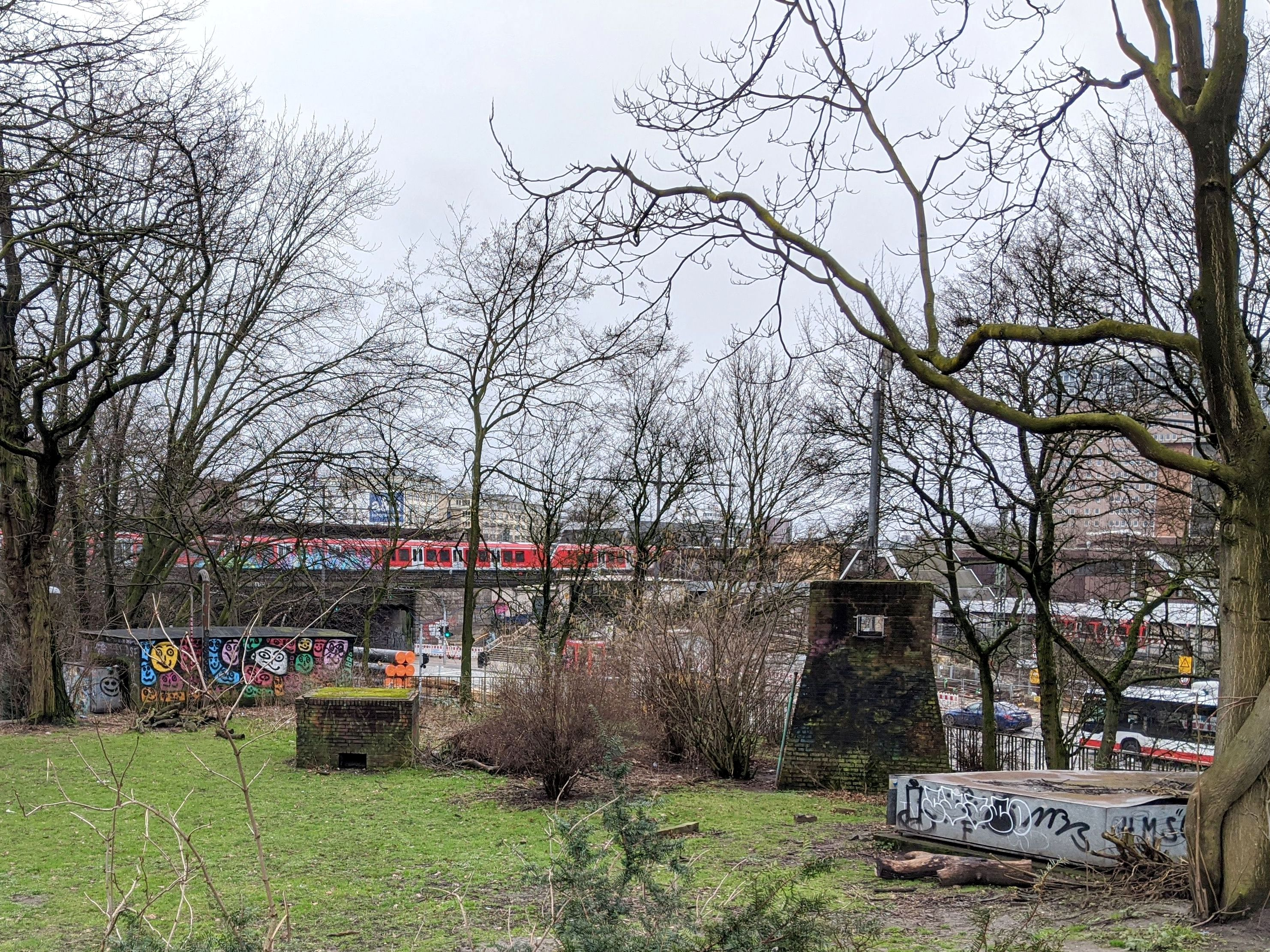 Tiefbunker Berlinertordamm in Hamburg, Ansicht von Norden, im Hintergrund der S-Bahnhof Berliner Tor